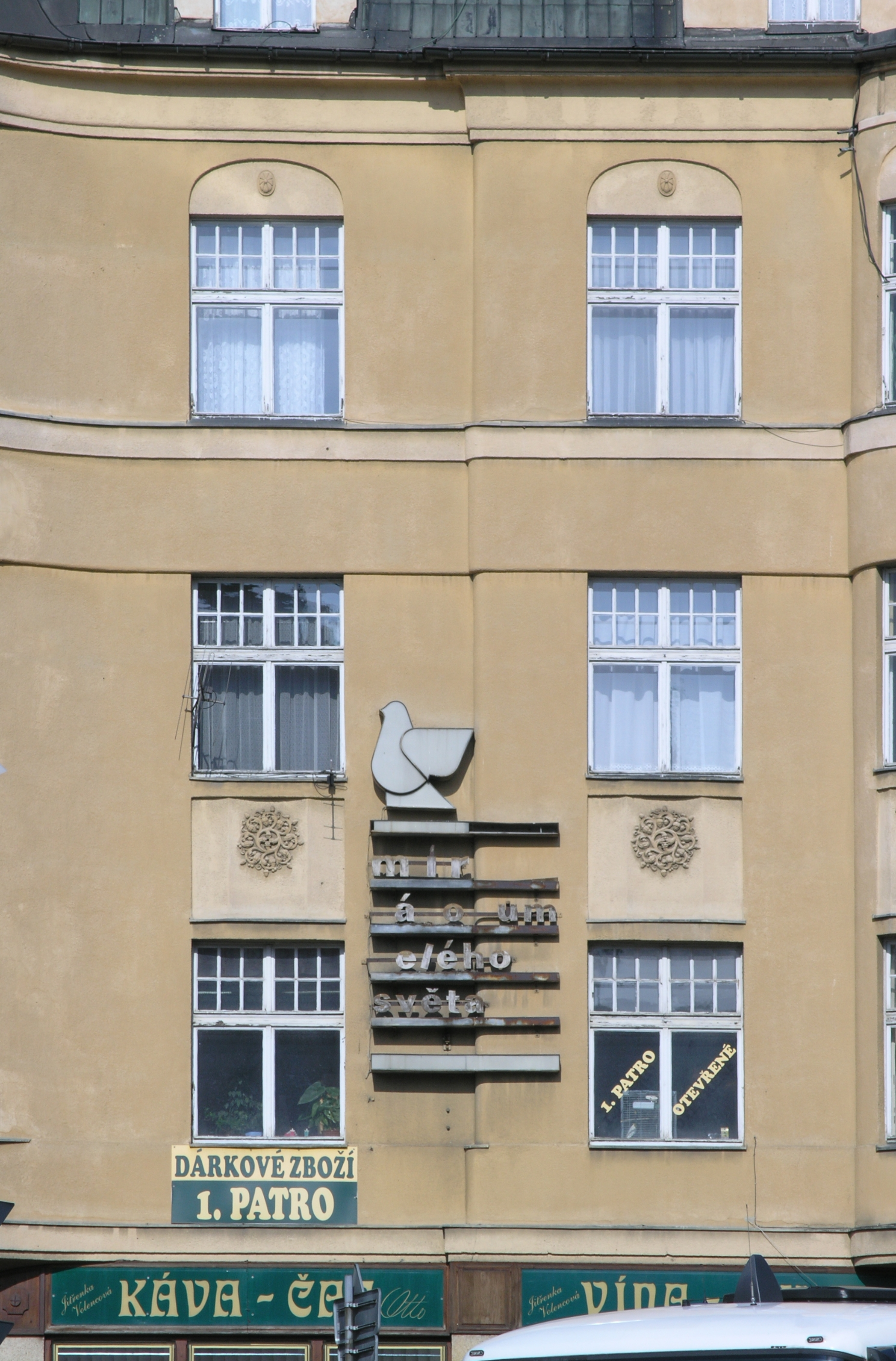 Liberec I-Staré Město, Šaldovo náměstí 30/4, fasáda, zbytek nápisu „mír národům celého světa“.